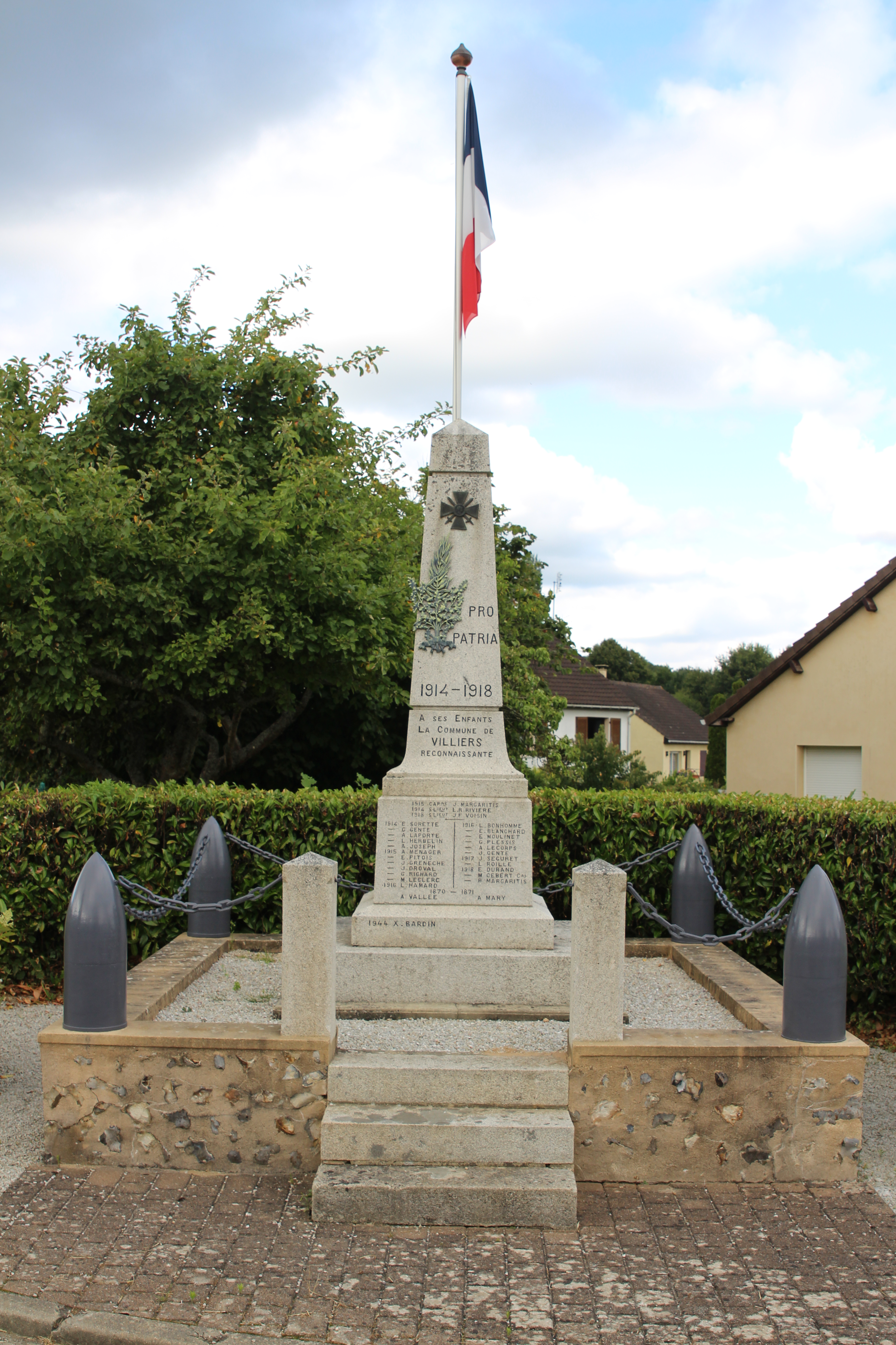 Villiers-sous-Mortagne, Orne